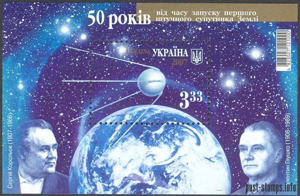 Марки України «50 років від часу запуску першого штучного супутника Землі»